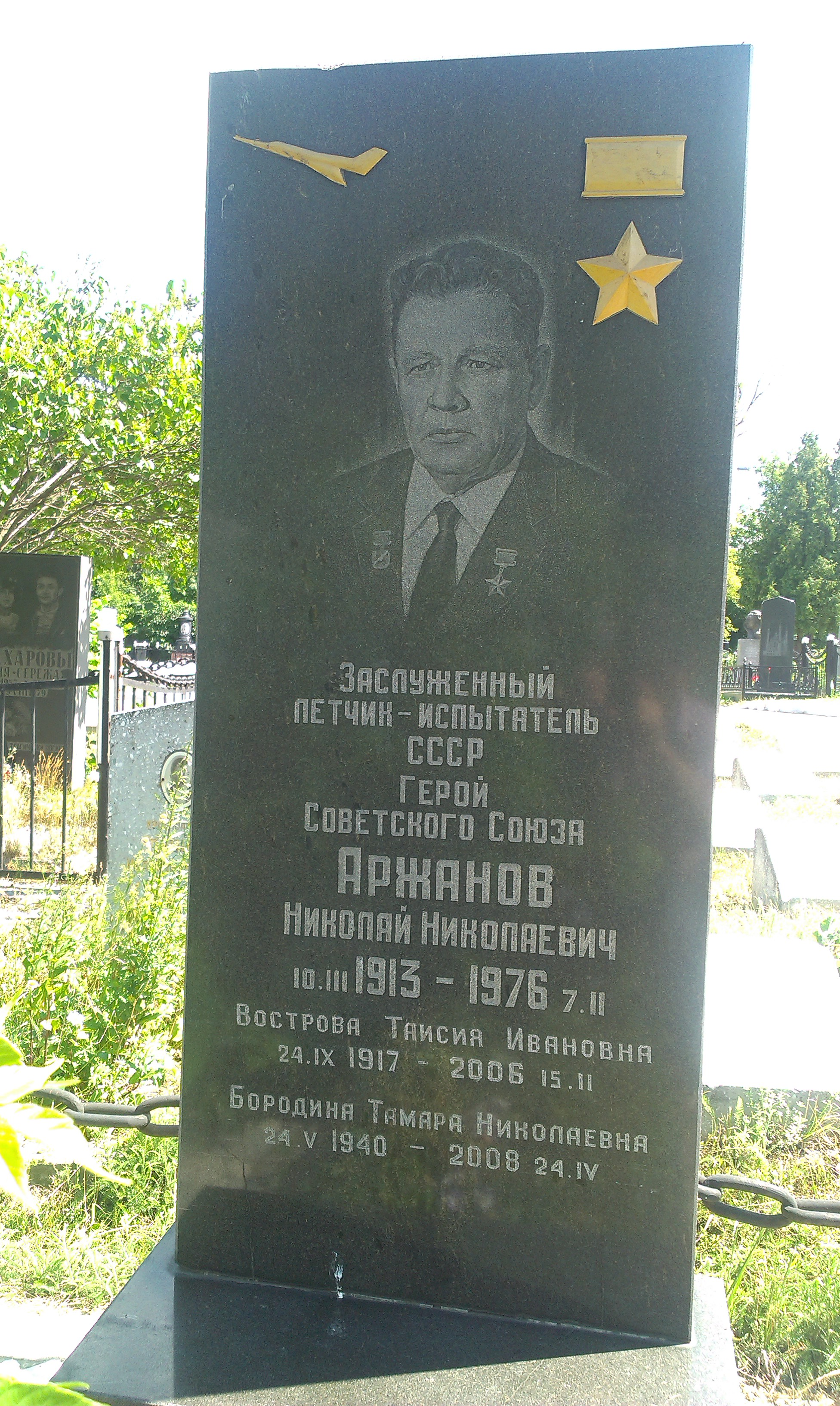 Арское кладбище